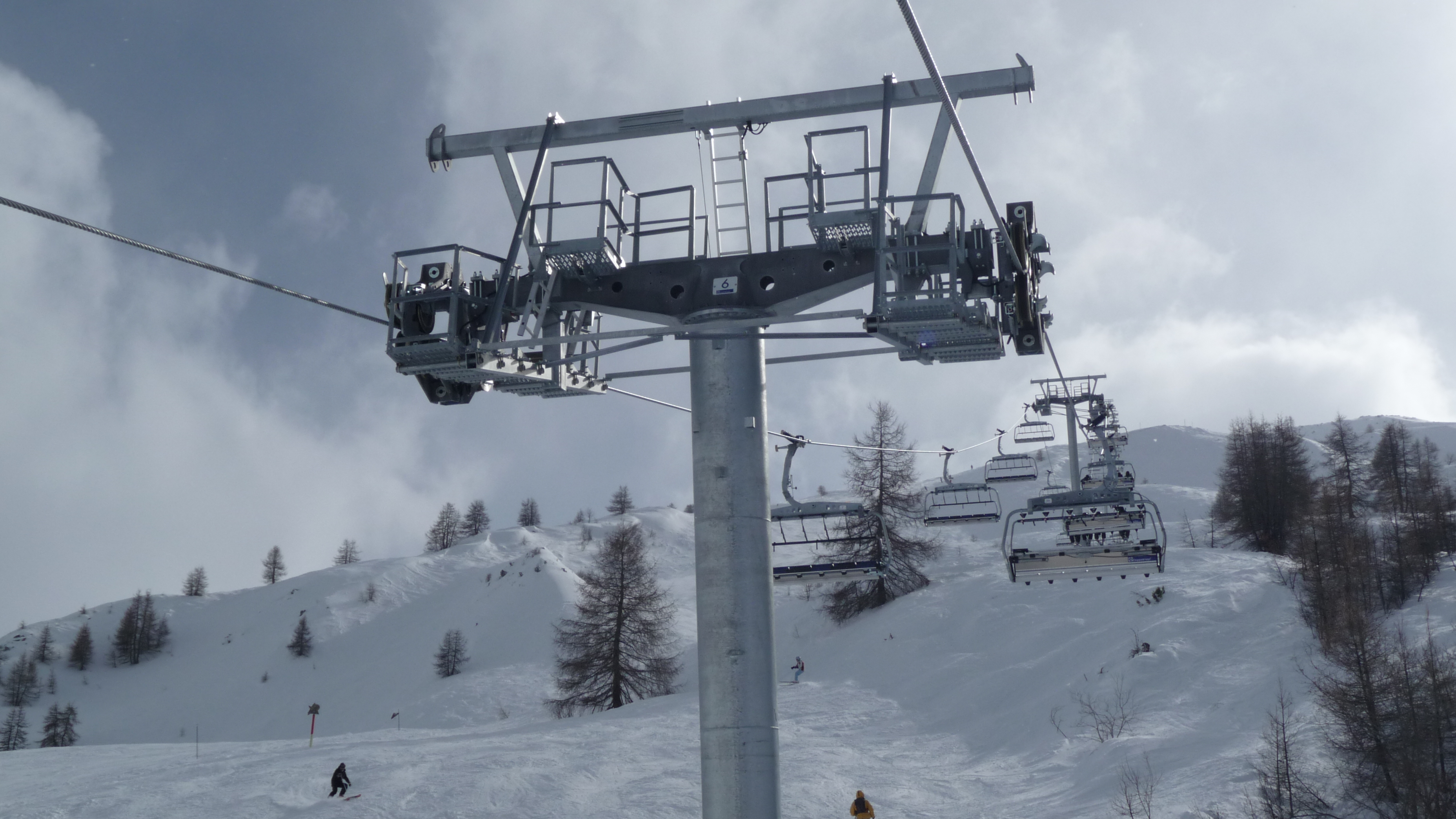 Télésiège débrayage Cornafond - Valloire